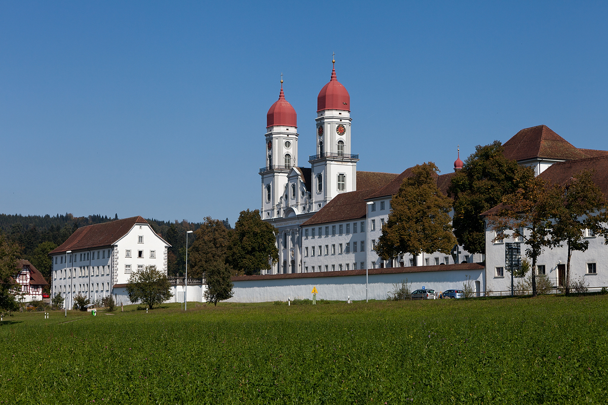 Kloster St. Urban im Dorfteil St. Urban von Pfaffnau